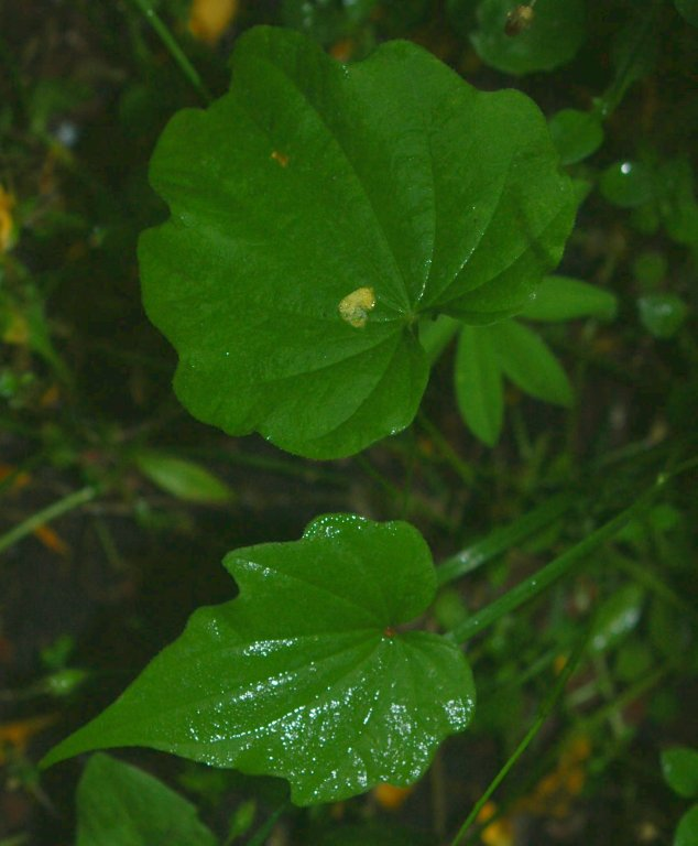 Dioscorea nipponica, young leaves